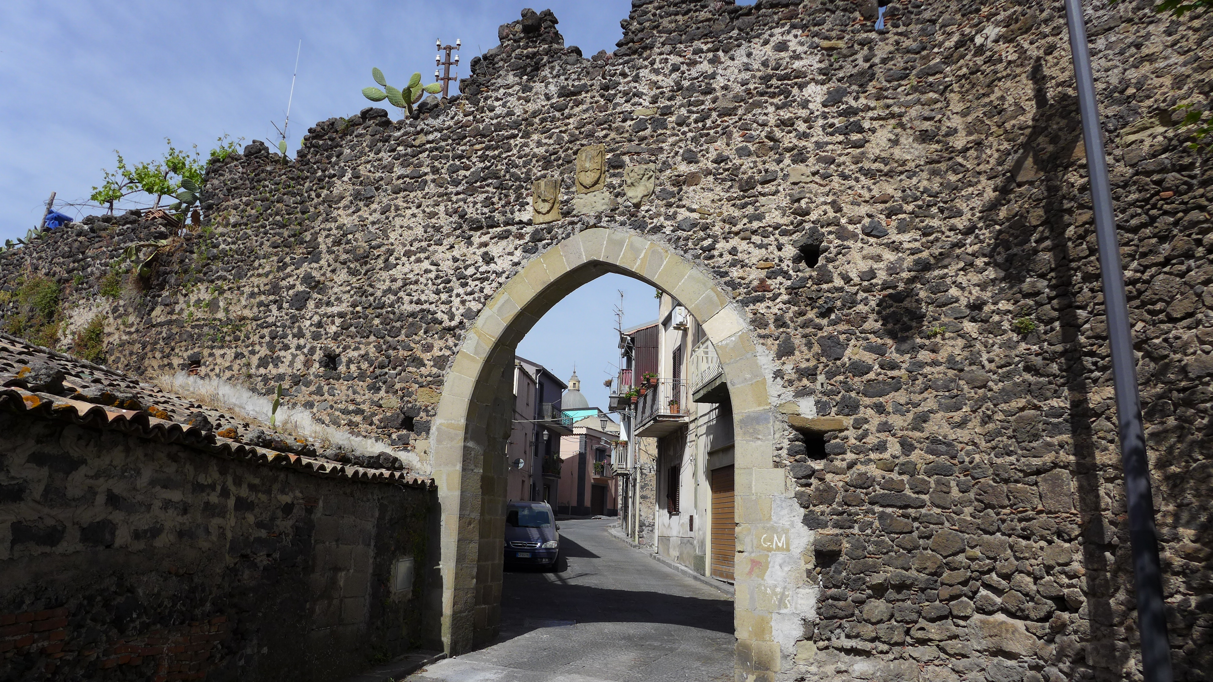 Mura di cinta e porte medioevali This is a photo of a monument which is part of cultural heritage of Italy.